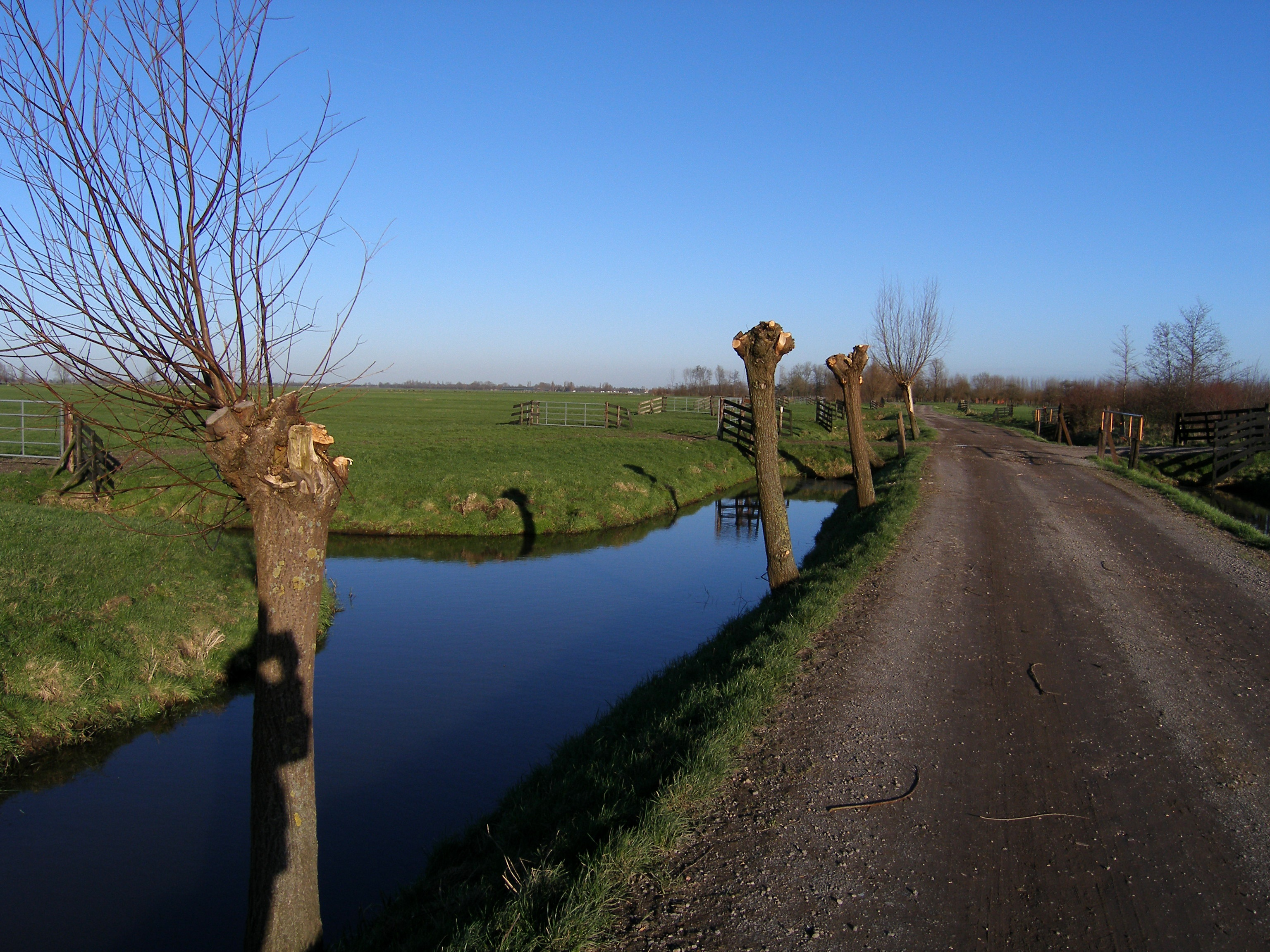 Tiendweg in de polder Willige Langerak, onderdeel van de Lopikerwaard. Het water is de Voorwetering.